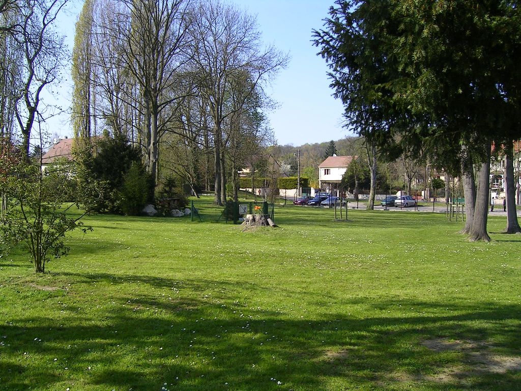 Parc de la Mairie-le jardin, allée du Sichet Photo personnelle (own work) de Marianna